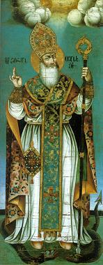 Портрет Ованеса Одзнеци